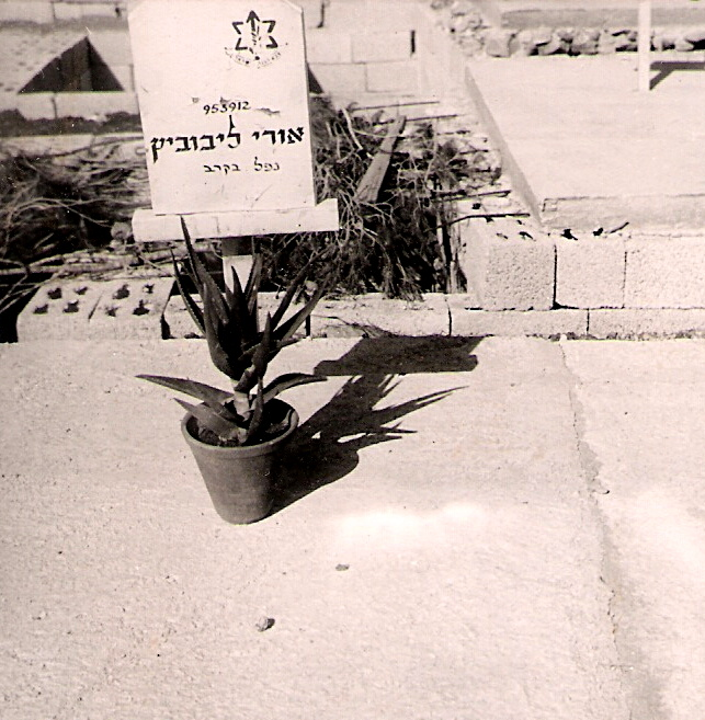 הקבר של אורי לבוביץ בהר הרצל עם המצבה הזמנית 1967